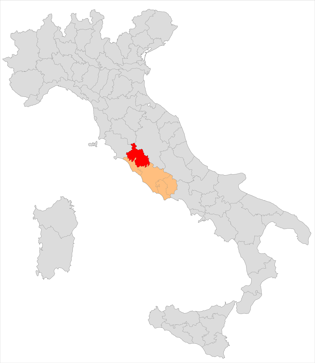 Il circondario di Viterbo nella provincia di Roma.